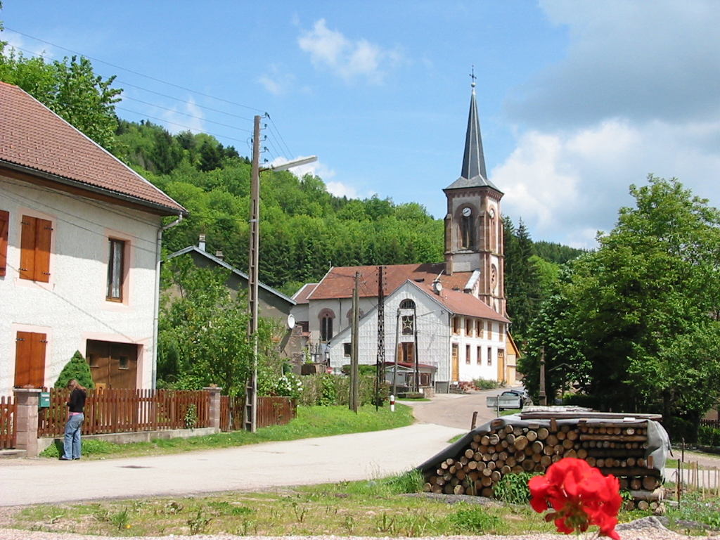 La Petite-Fosse Commune du canton de Provenchères-sur-Fave (Vosges) Photo personnelle du 4 juin 2006. Copyright © Christian Amet